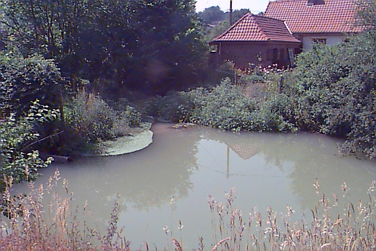 La source de la Lys à Lisbourg